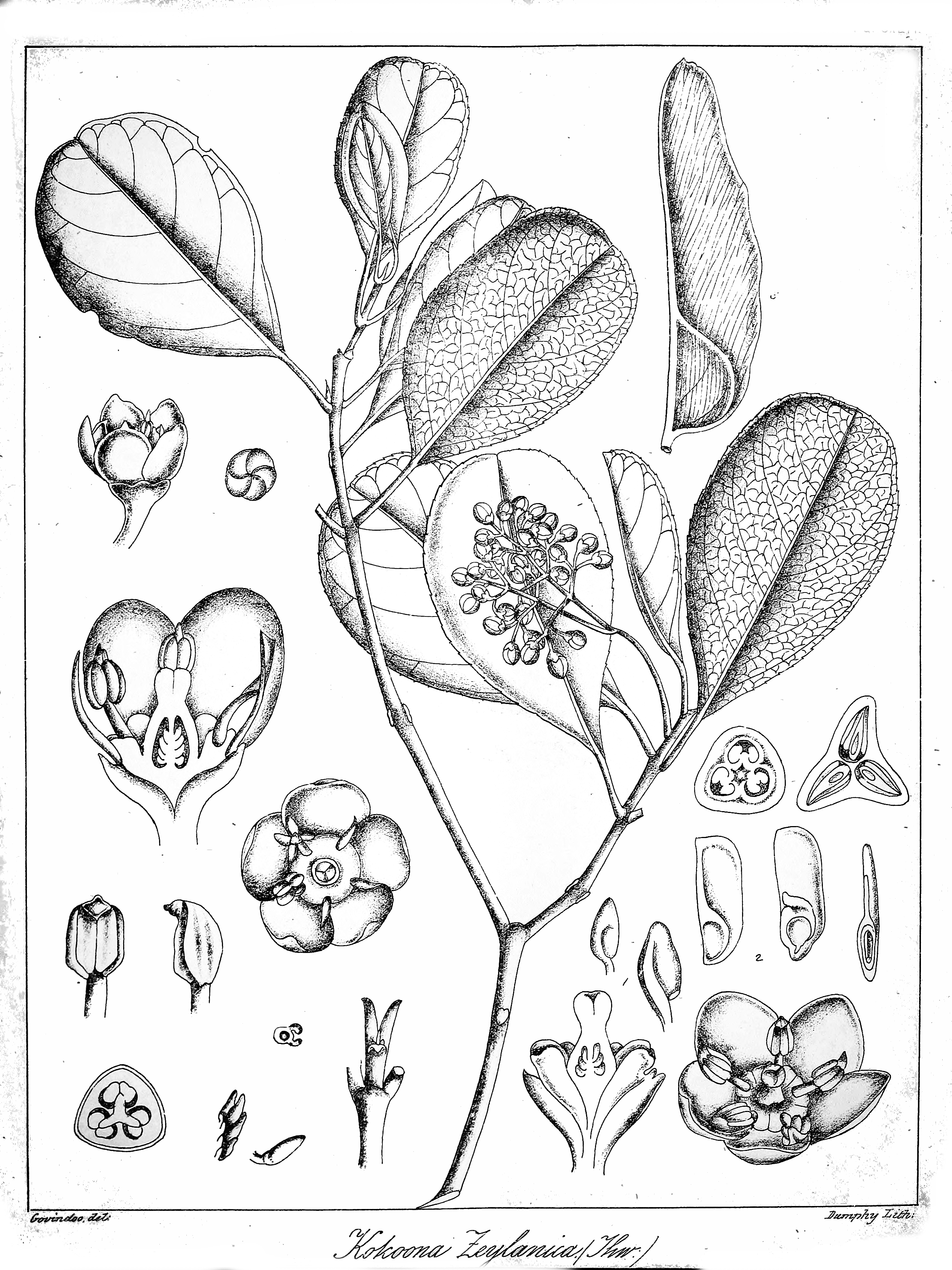 Kokoona zeylanica